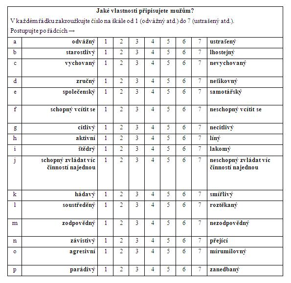 Sémantický diferenciál-ukázka z dotazníku